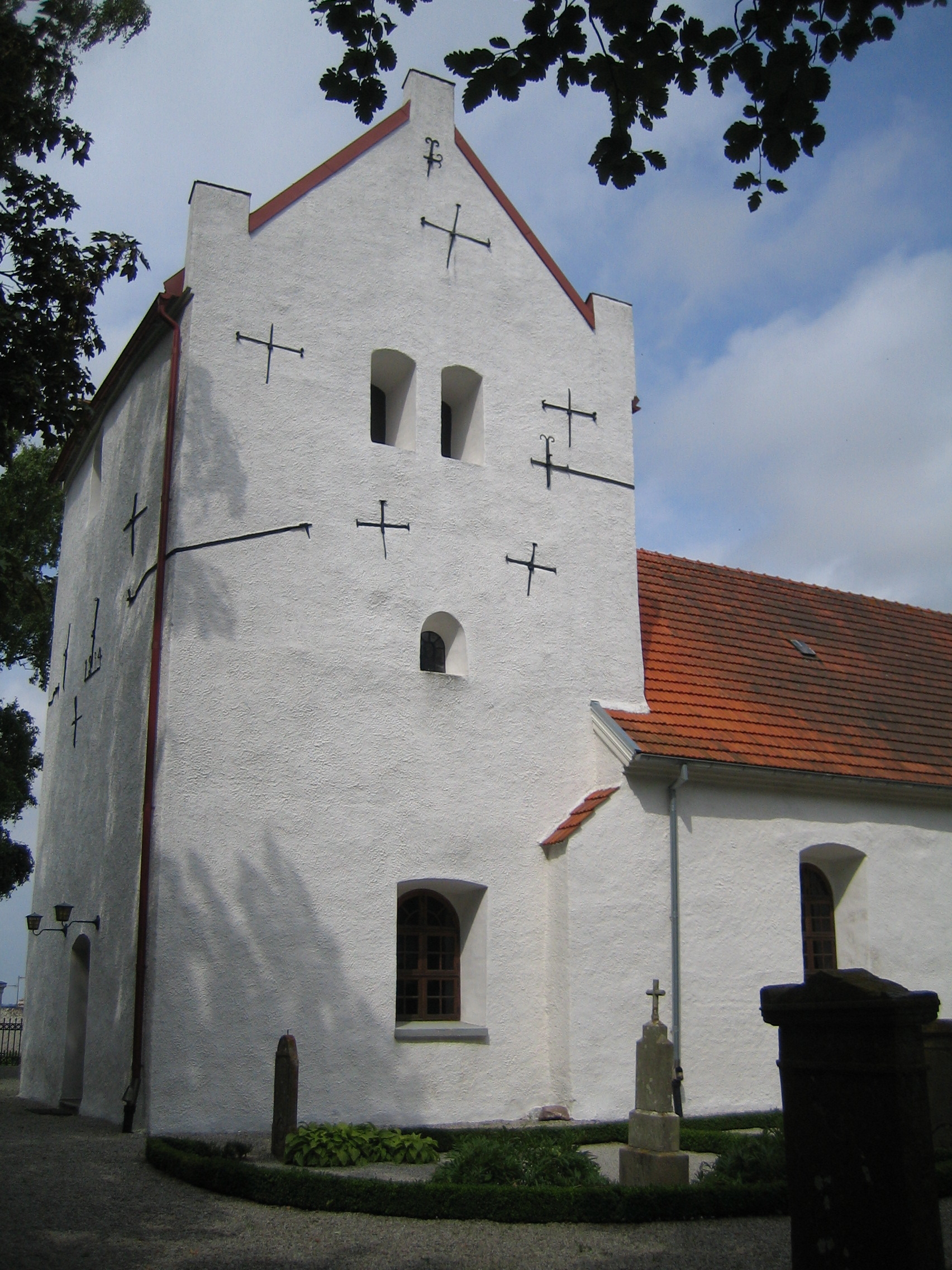 Gylle kyrka.